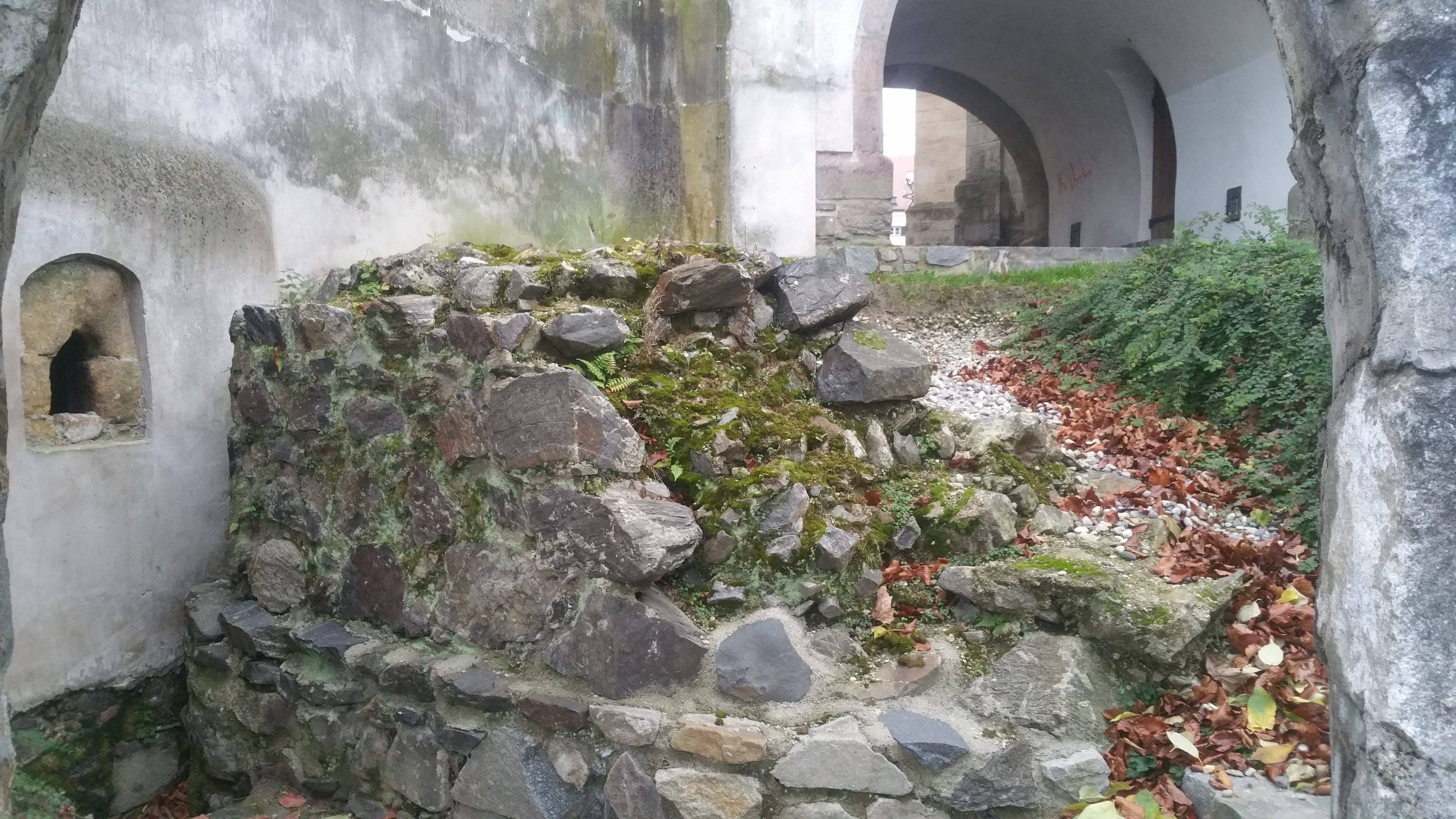 Reste des Kastells, unterhalb der Kirche